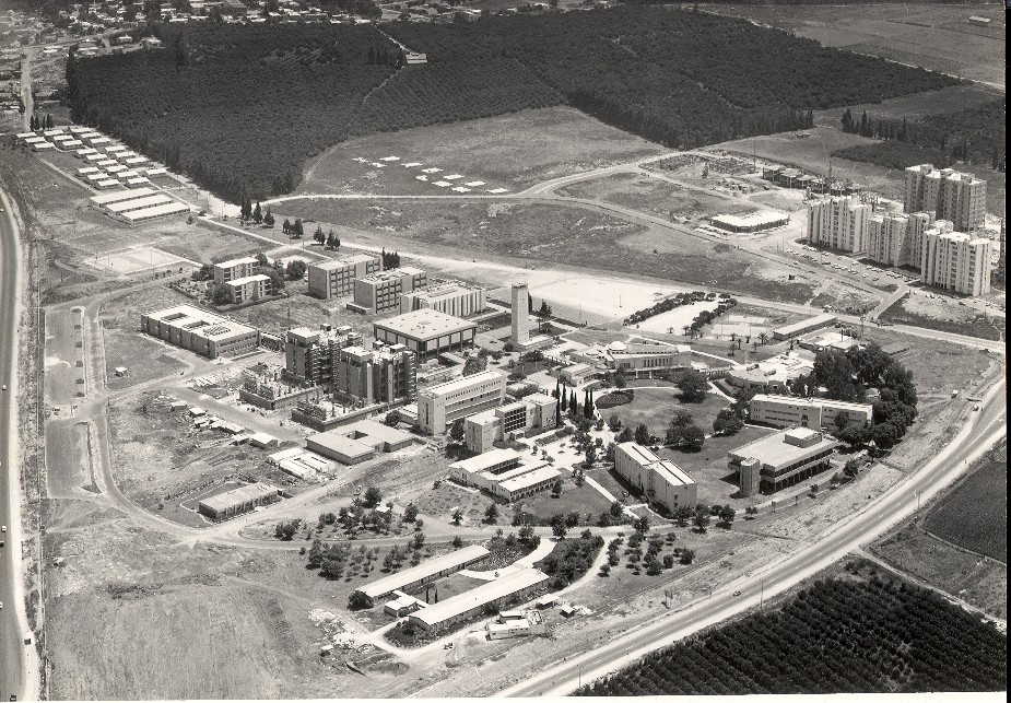 Campus-Air